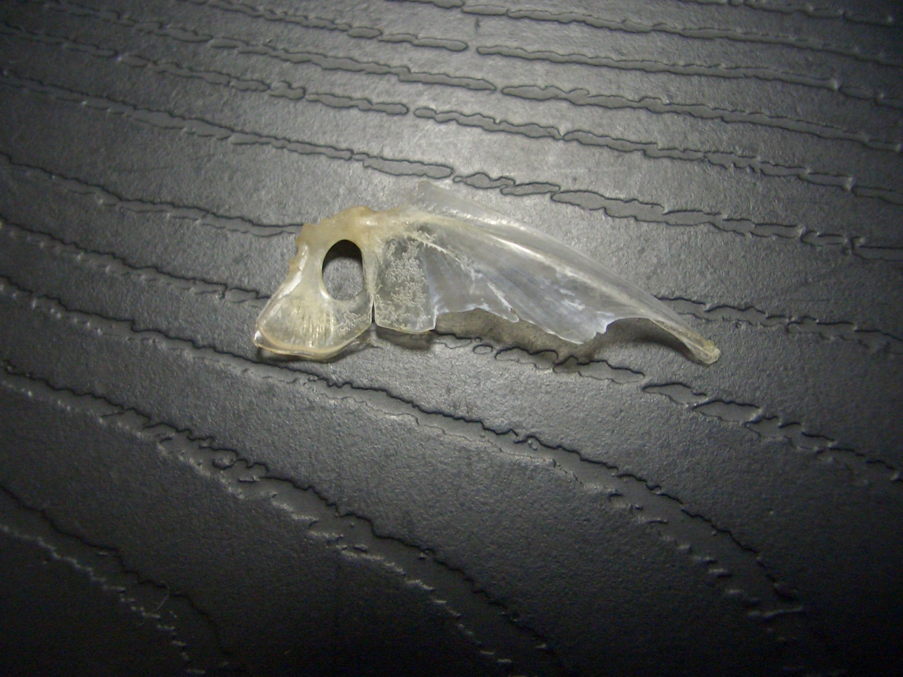 鯵の鯛の鯛